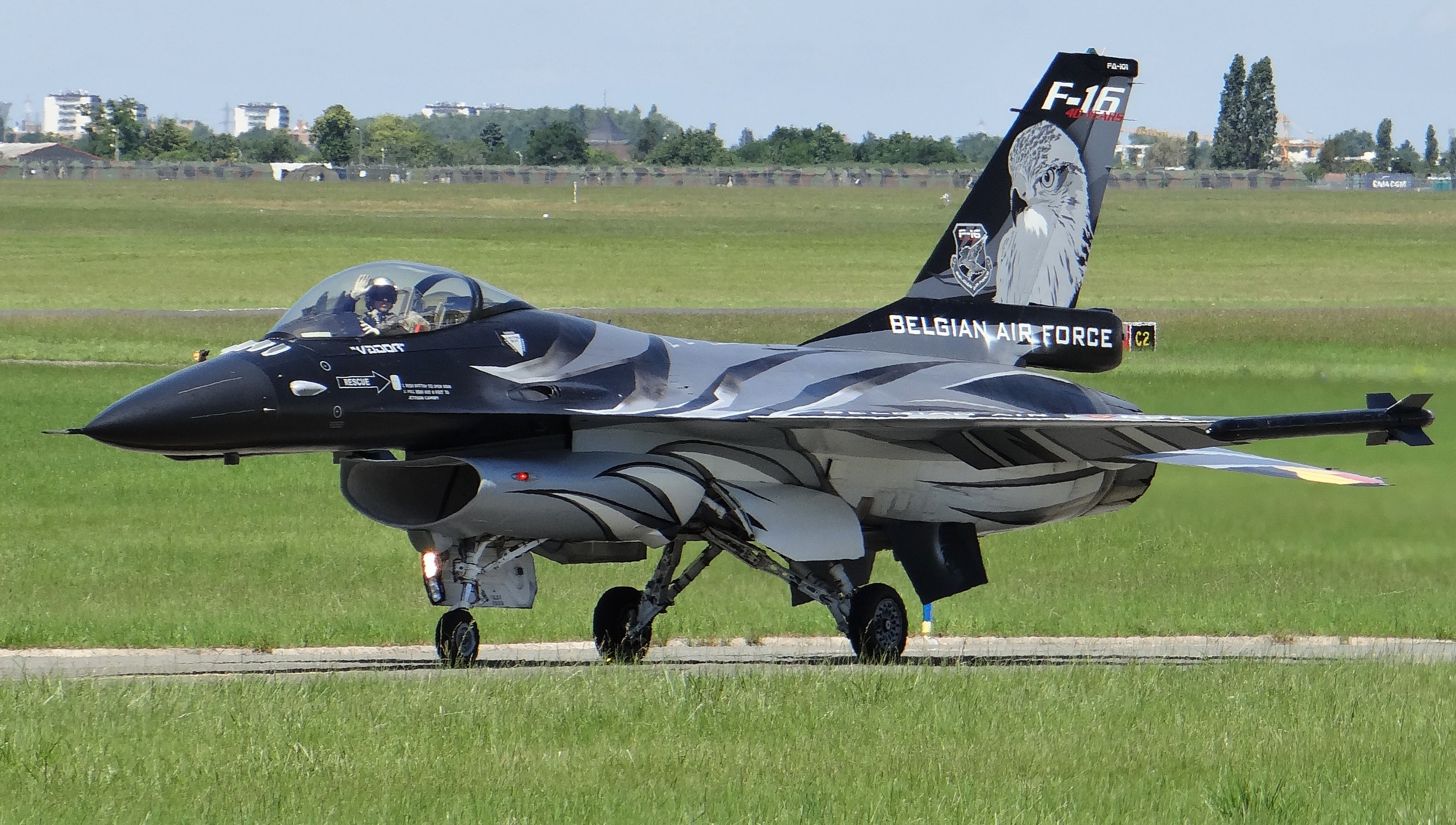 F16 de l'Armée de l'air belge en démonstration au salon de Paris-Le Bourget, juin 2019